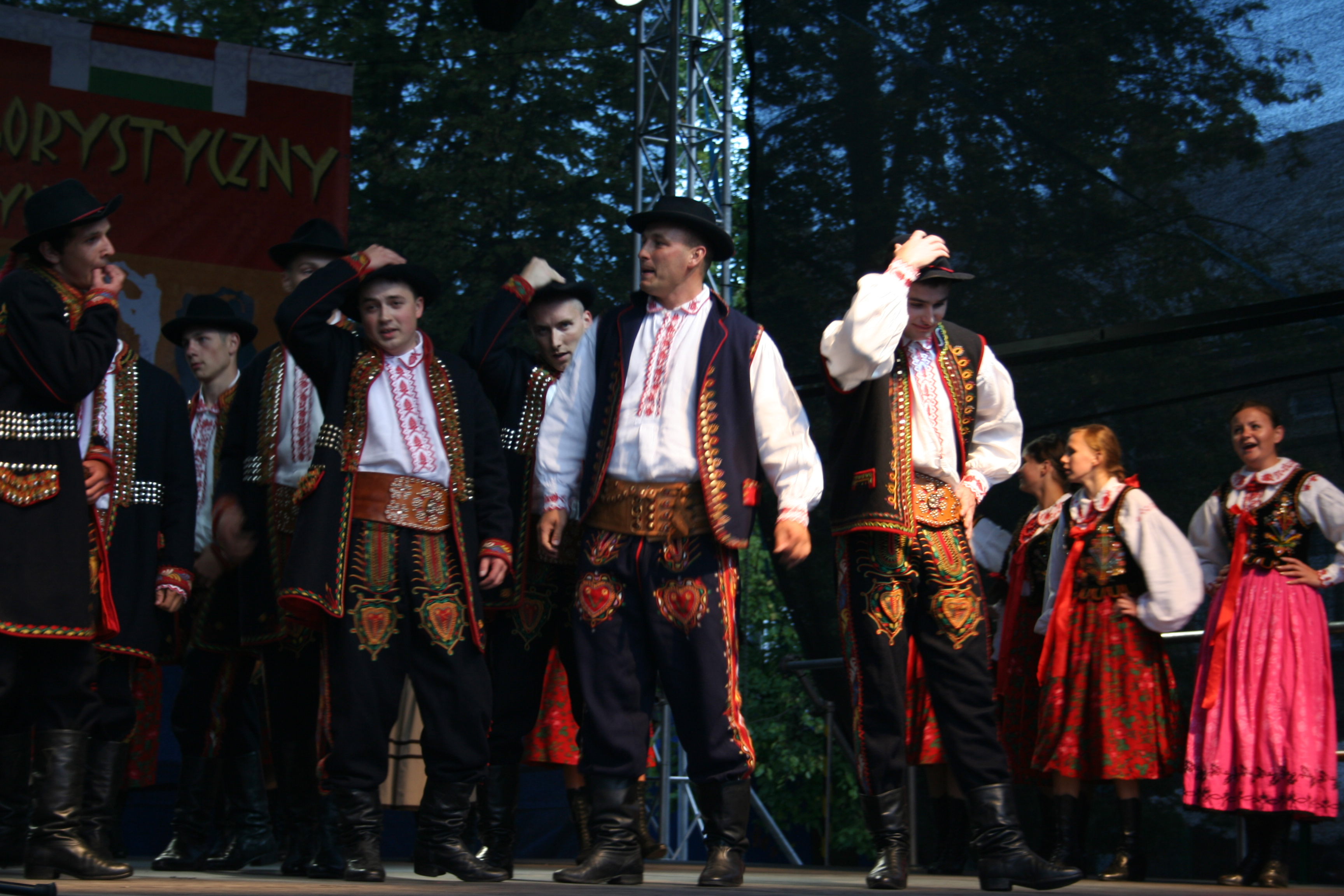 V Międzynarodowe Dni Wina Jasło 2010 i Wyszehradzki Festiwal Folklorystyczny. Występ zespołu Lachów Sądeckich.